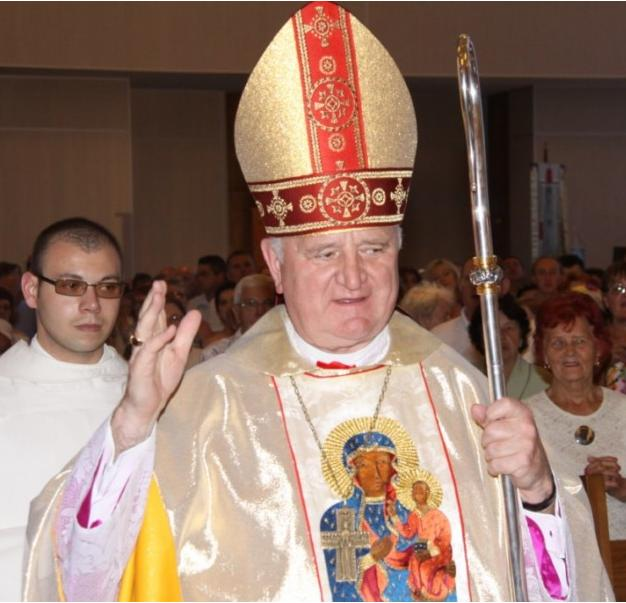 Biskup Stefanek podczas Polonijnej Pielgrzymki Słuchaczy Radia Maryja w Dolestown w Pensylwanii - I niedz. lipca 2010